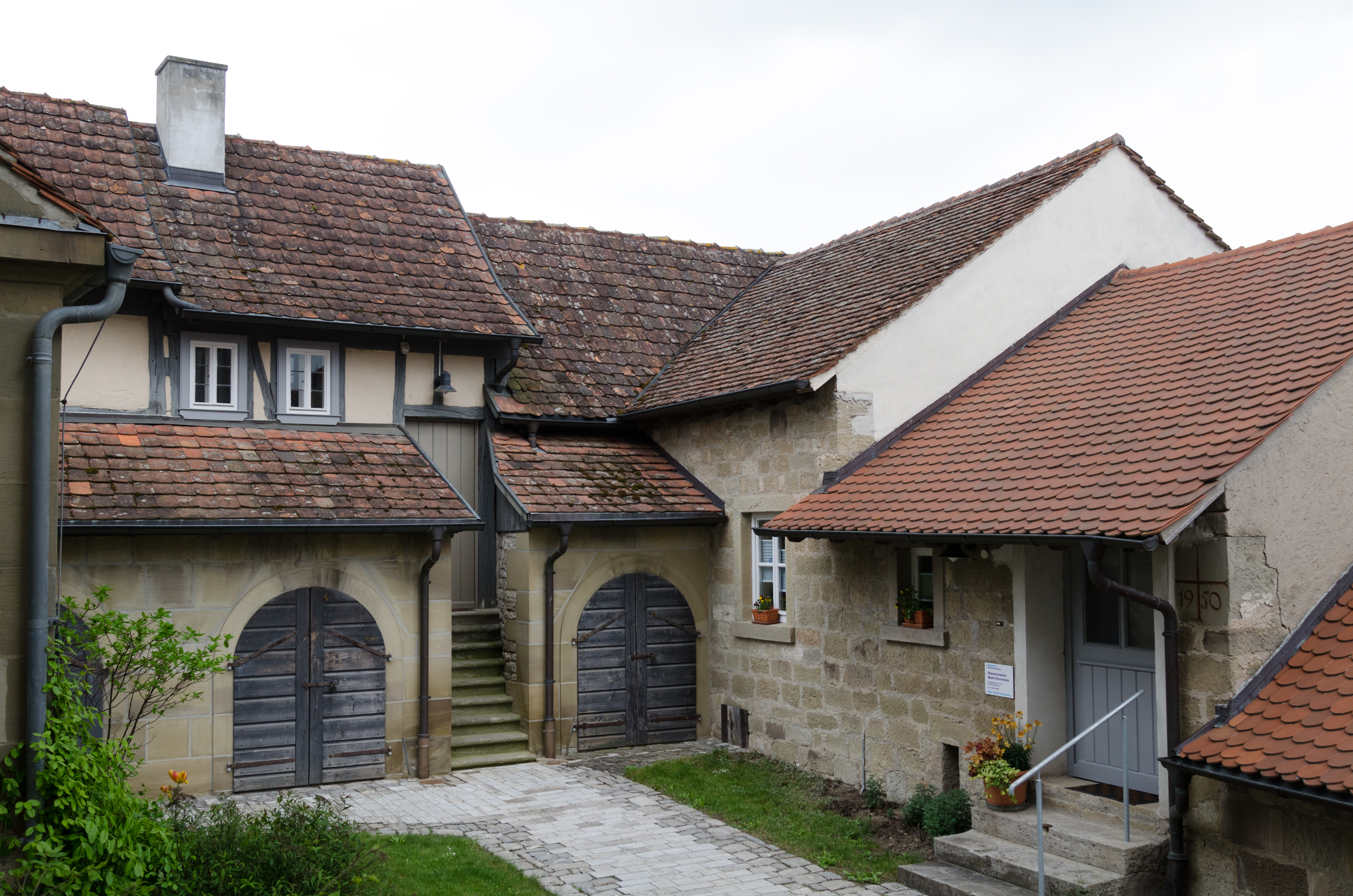 Iphofen, Nenzenheim, Kirchenburganlage